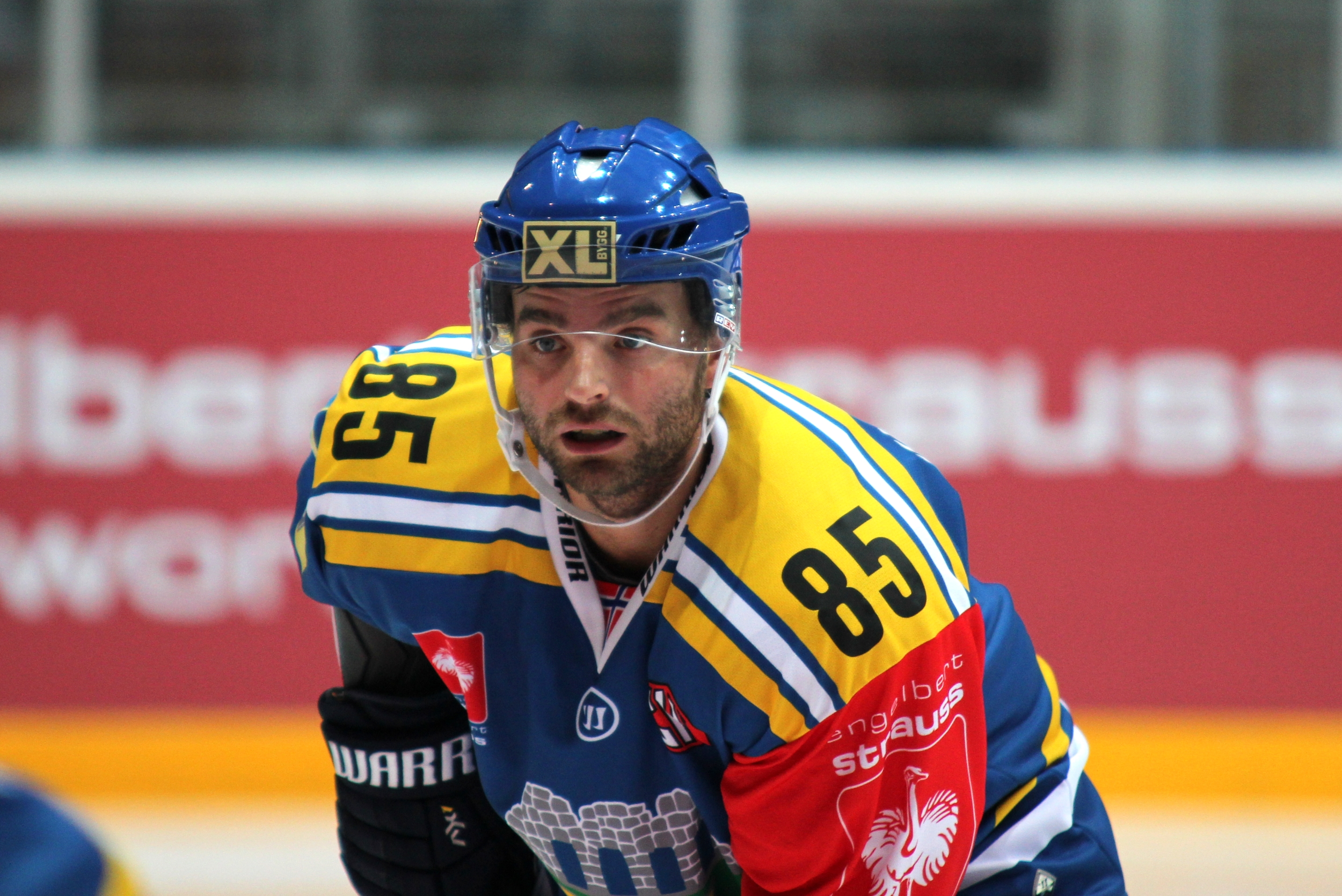 Lars Erik Hesbråten (H 85).